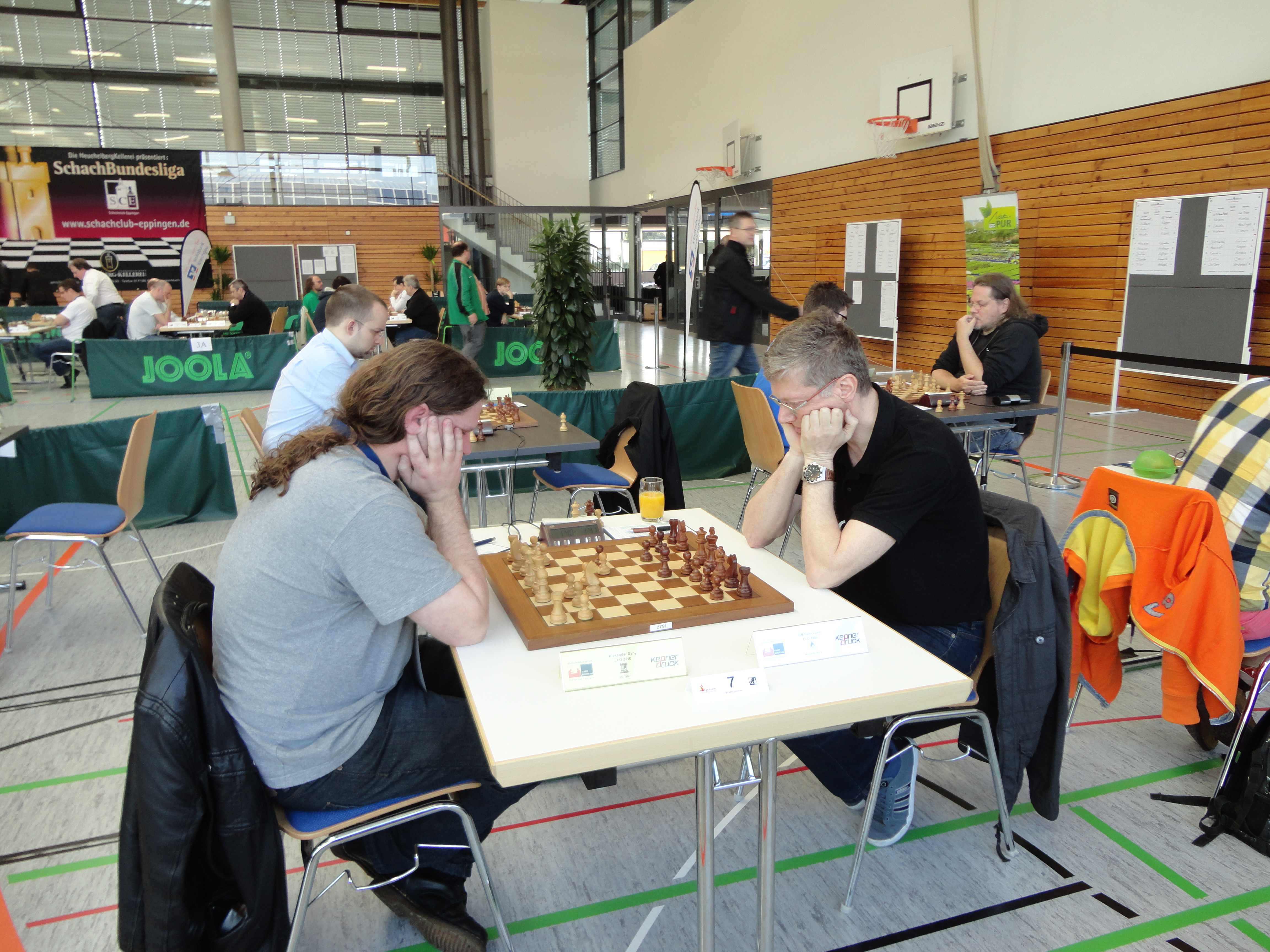 Im Vordergrund: Alexander Dany - Felix Levin, Finale der Deutschen Schachbundesliga Saison 2013/2014 in der Hardwaldhalle Eppingen.